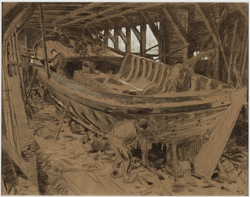 WB Tholen Botter bouw